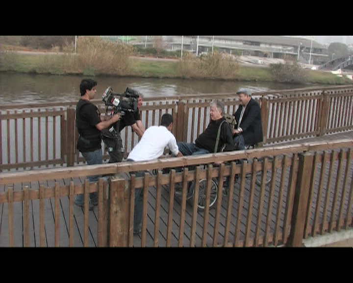 צילום בסטאדיקאם בנווה צדק